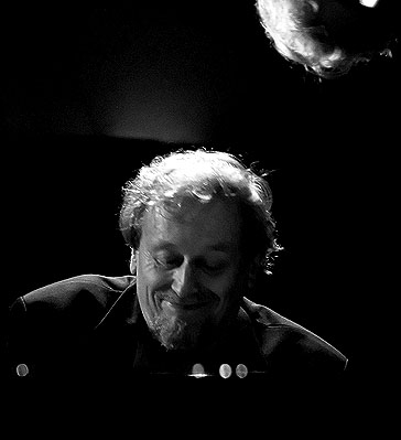 Adam Makowicz